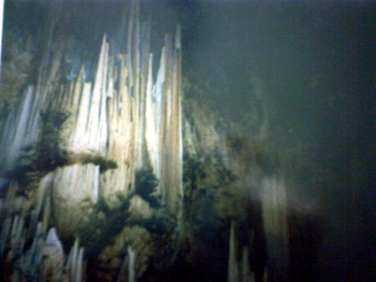 La grotte d'Antiparos, Cyclades